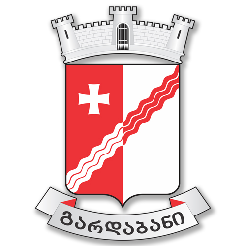 გარდაბნის მუნიციპალიტეტის გერბი